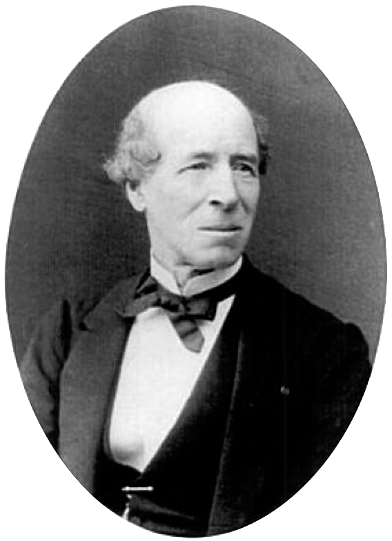 Portrait de l'architecte Louis-Jules Bouchot en 1848. Il réalisa notamment plusieurs gares : Milan, Nice, Valence, Toulon.